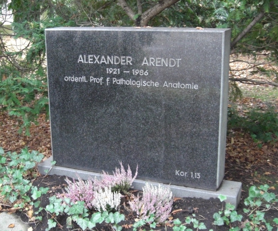 Grab des Mediziners Alexander Arendt (1921-1986) auf dem Südfriedhof in Leipzig